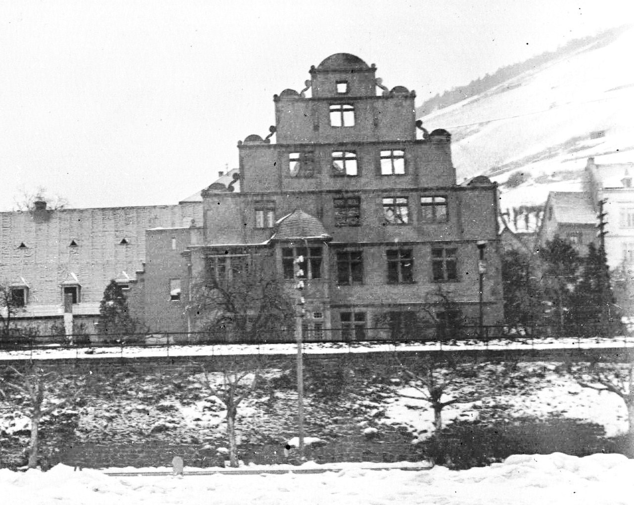 Ausgebranntes Hilchenhaus in Lorch (Rheingau)Folge der Kriegseinwirkung 1945